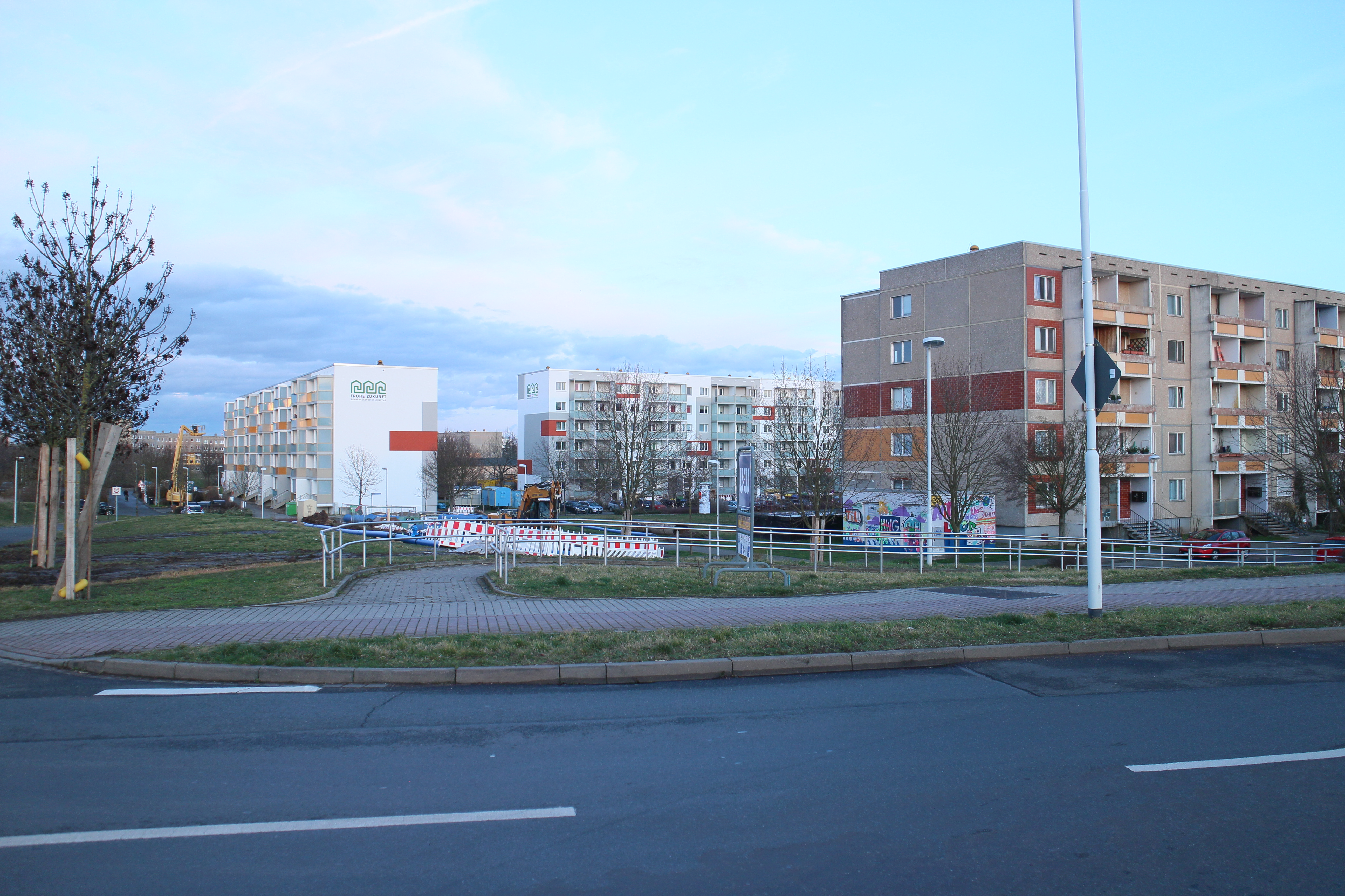 Neuere Version des Bildes mit drei Wohnblöcken in Halle (Saale), Stadtviertel Heide-Nord, 1. Wohnkomplex, Straßen Kolkturmring, Fischerstecherstraße und Saalering